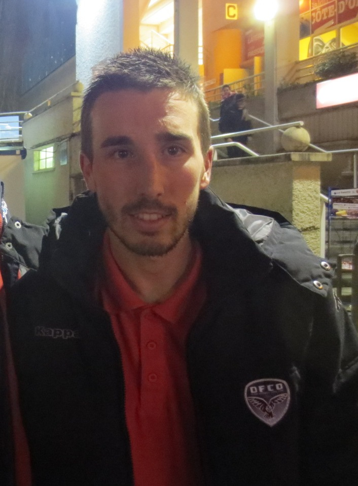 Romain Amalfitano au DFCO en 2013